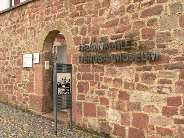 Eingang Hessisches Braunkohle Bergbaumuseum Borken